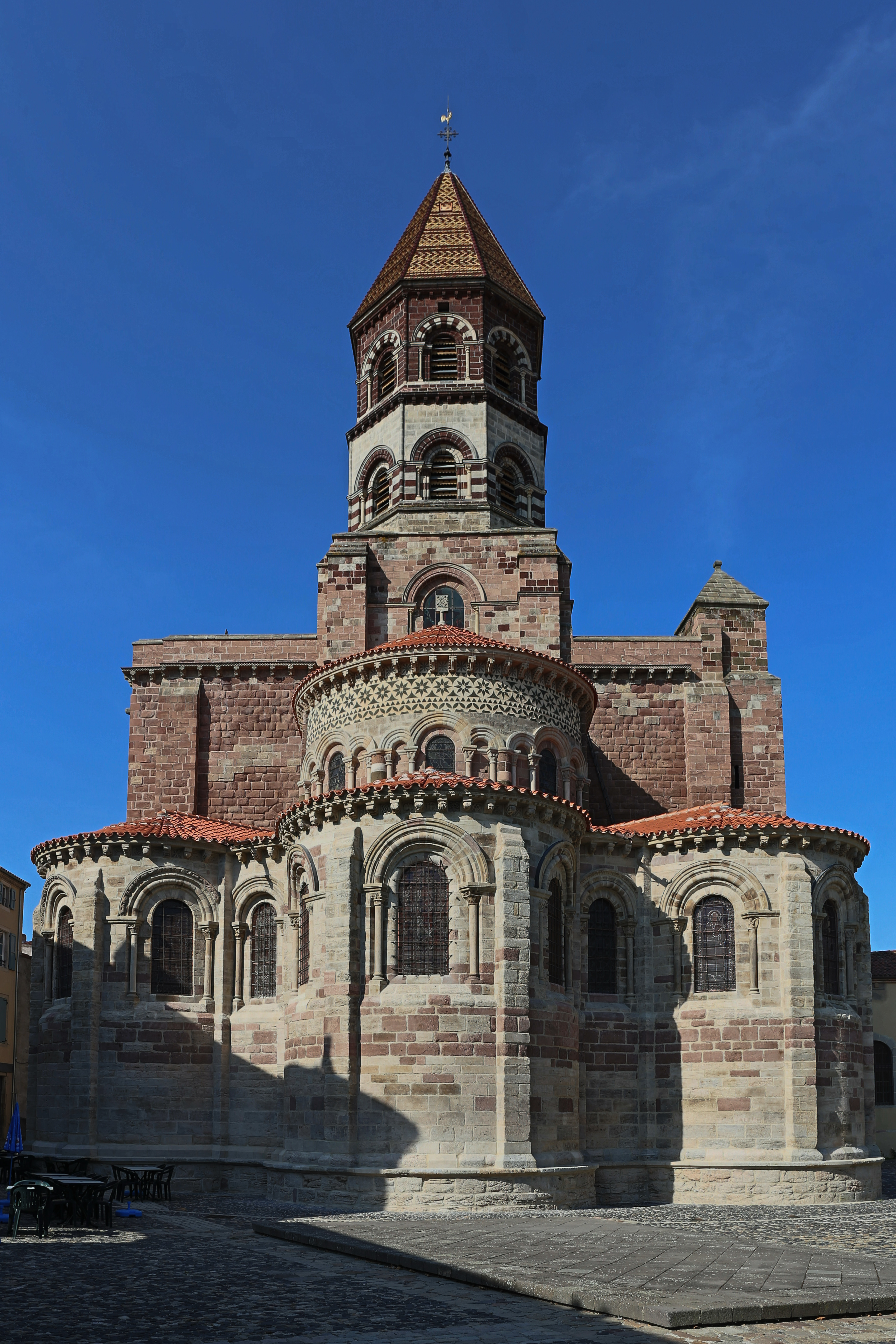 Basilique Saint-Julien de Brioude : le chevet vue de la place Grégoire de Tours. .